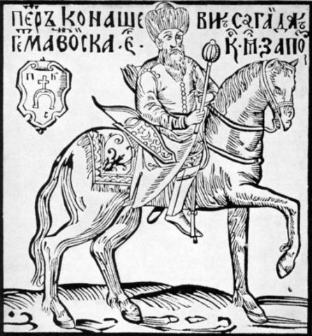 Гетьман Петро Конашевич Сагайдачний